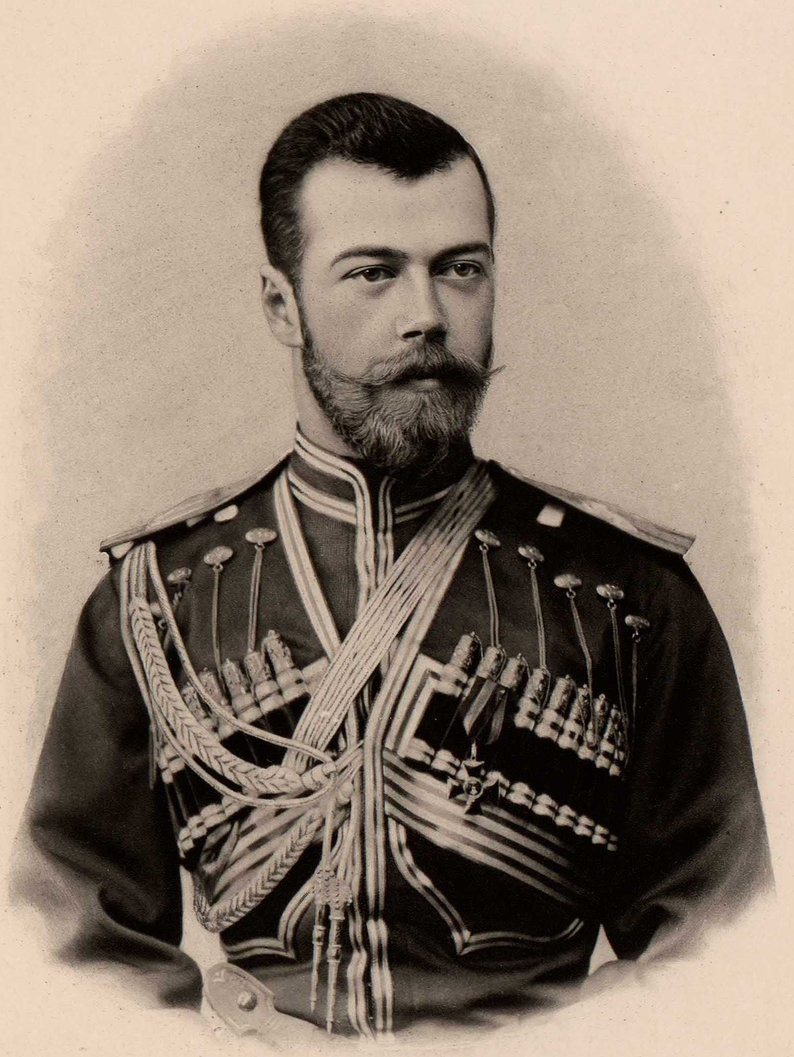 Государь Император Николай II Александрович Самодержец Всероссийский